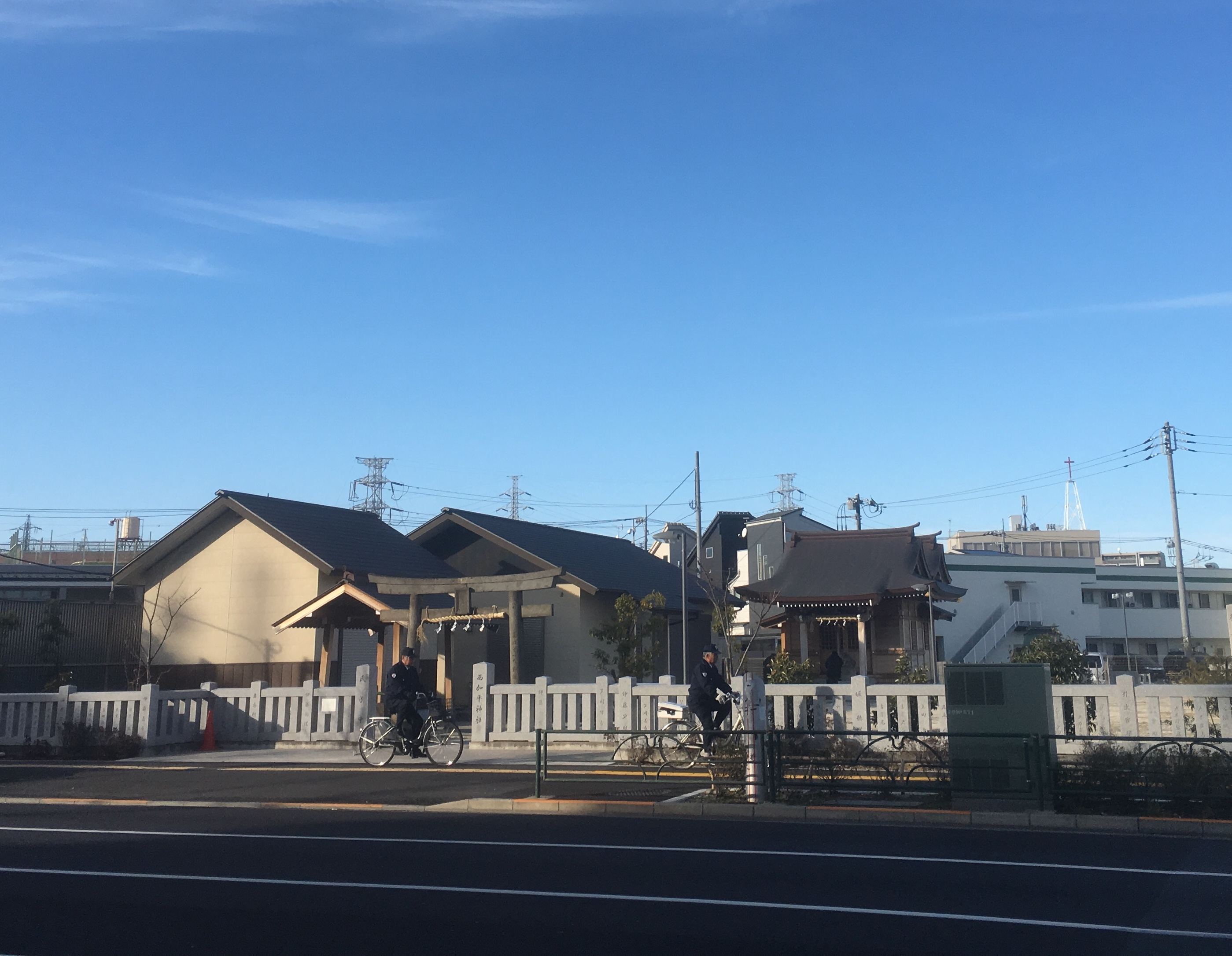 西加平神社 (Nishikahei Shrine)